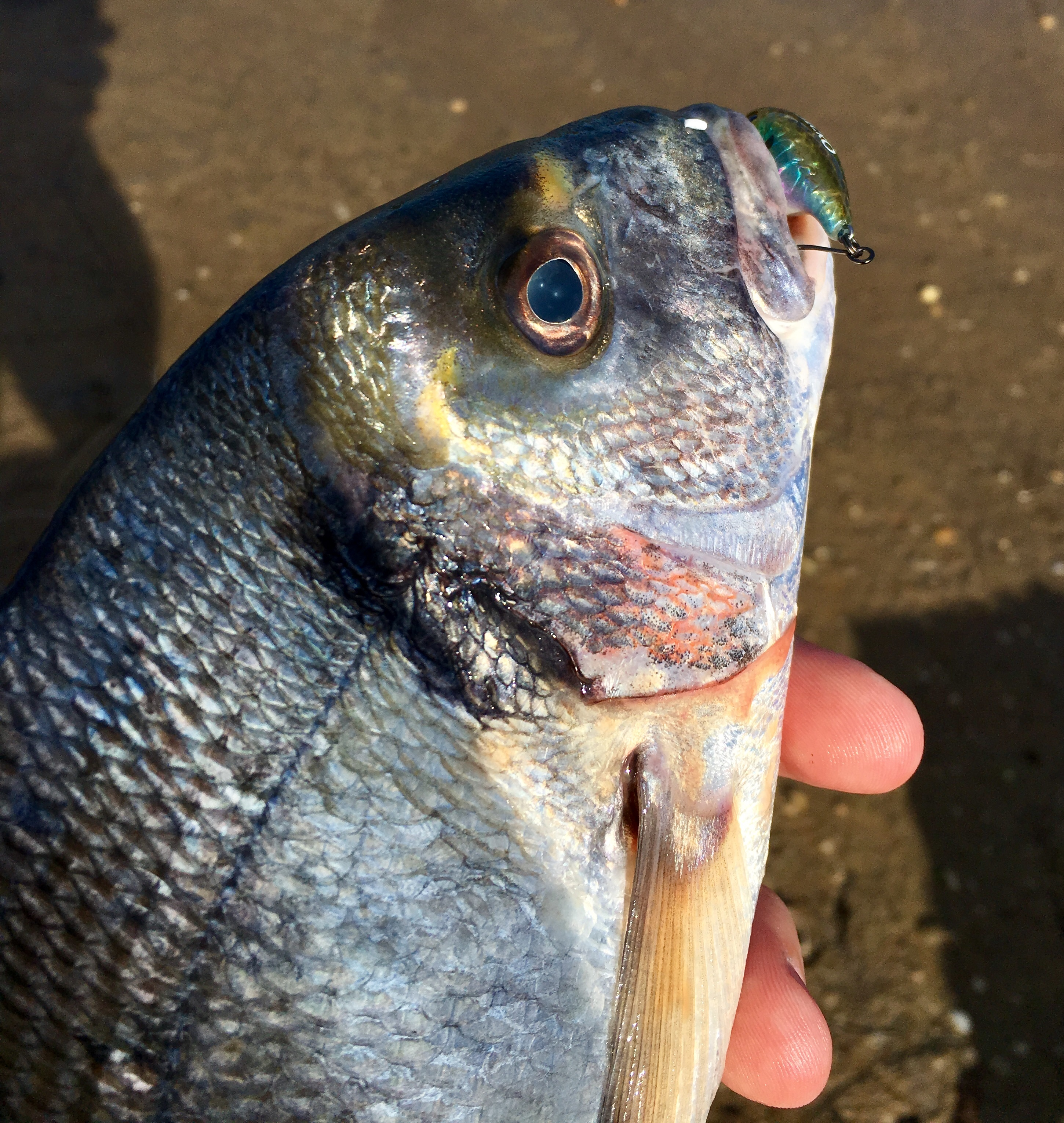 Goldbrasse gefangen in Fossalon